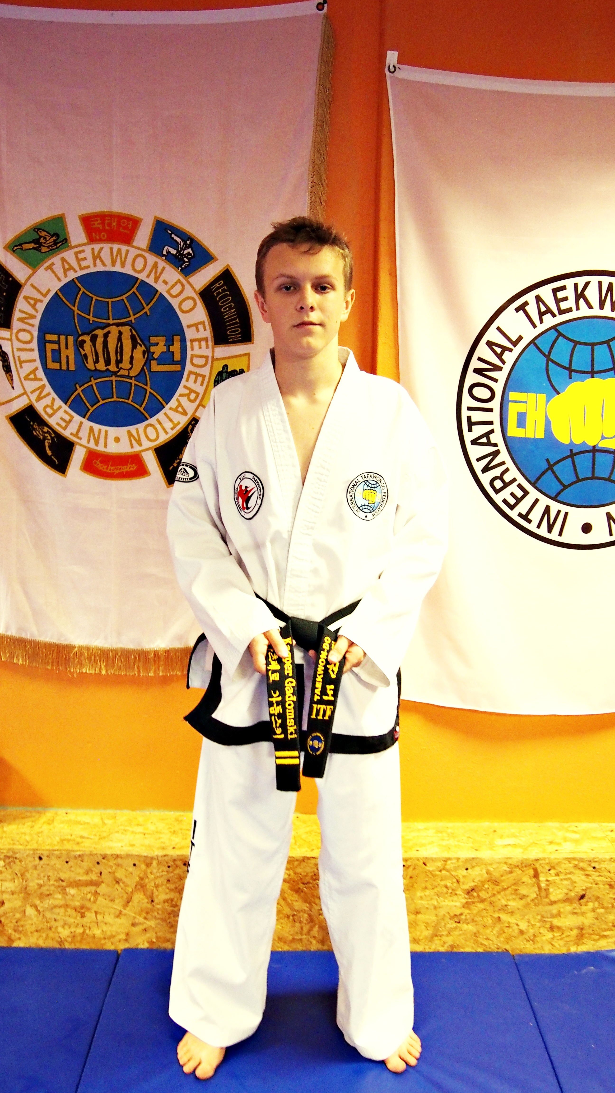 Kacper Gadomski